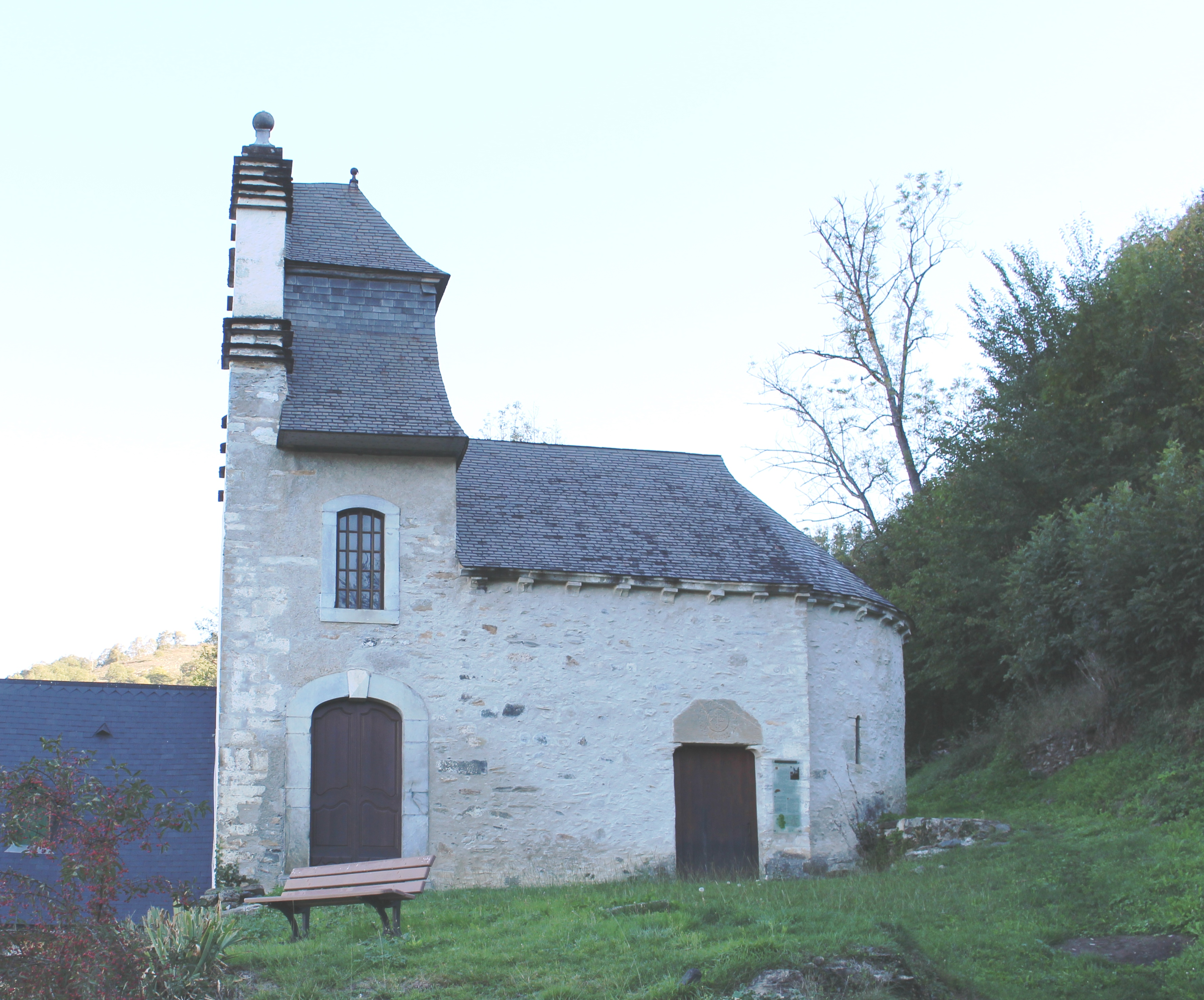 Église Sainte-Marie de Saint-Pastous (Hautes-Pyrénées)